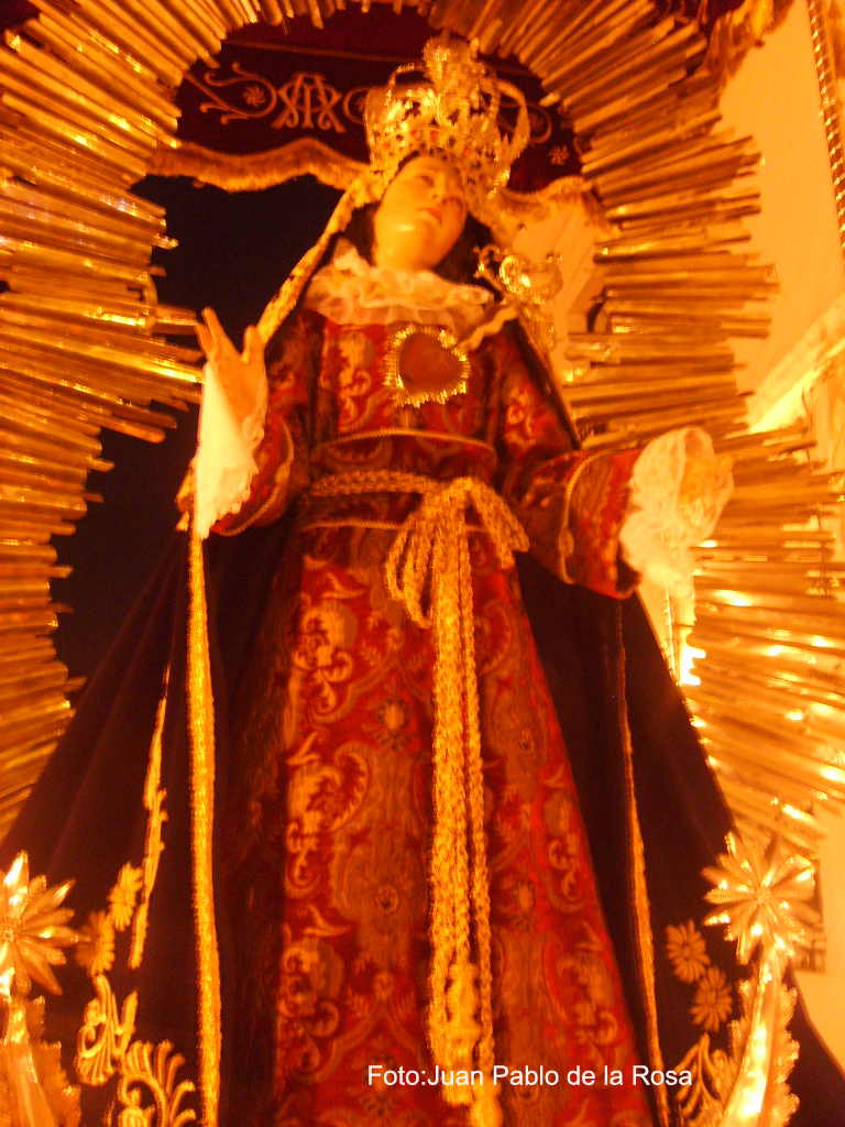 paso Virgen de los Dolores Popayán